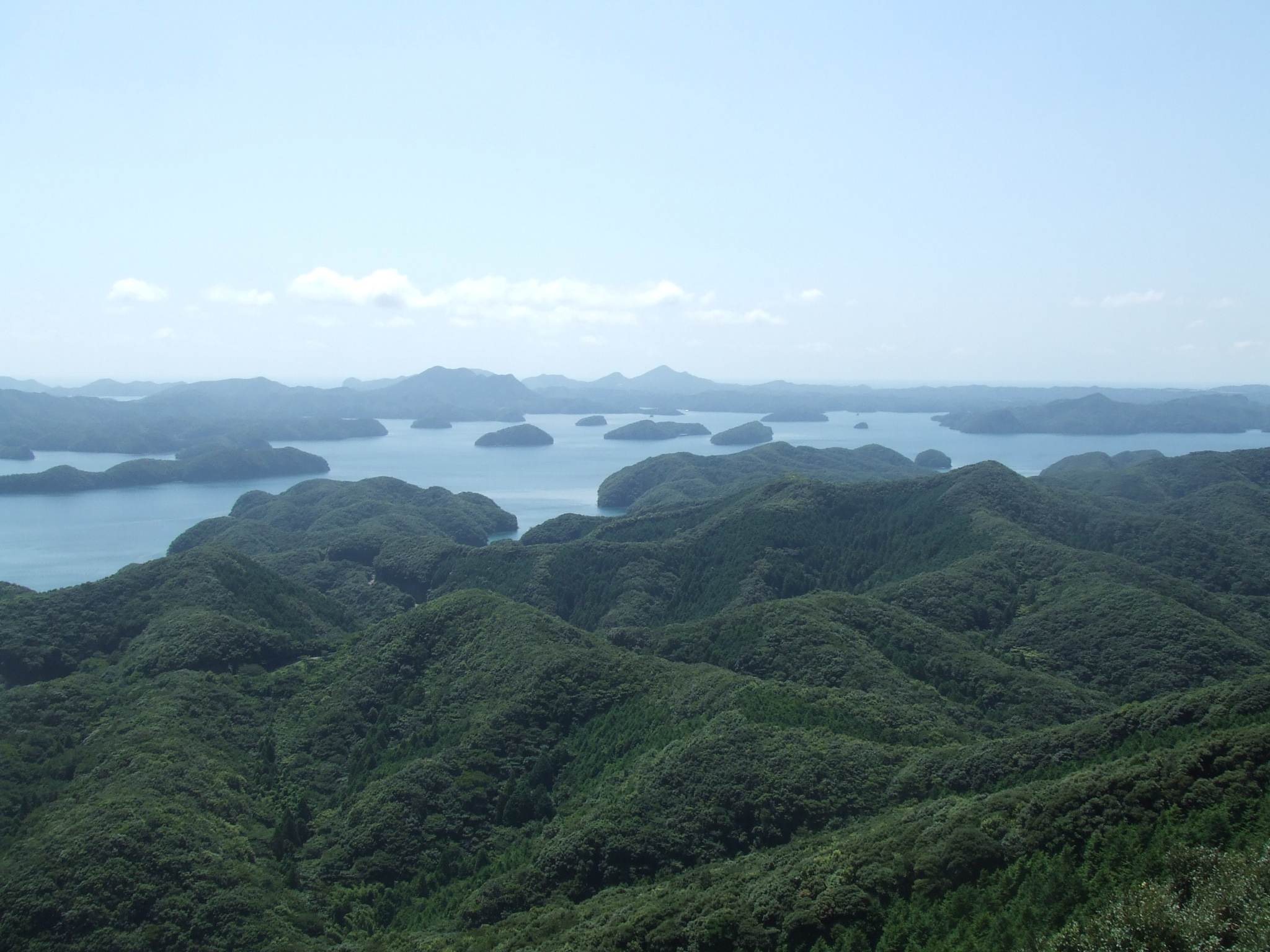 Затока Асо на острові Цусіма